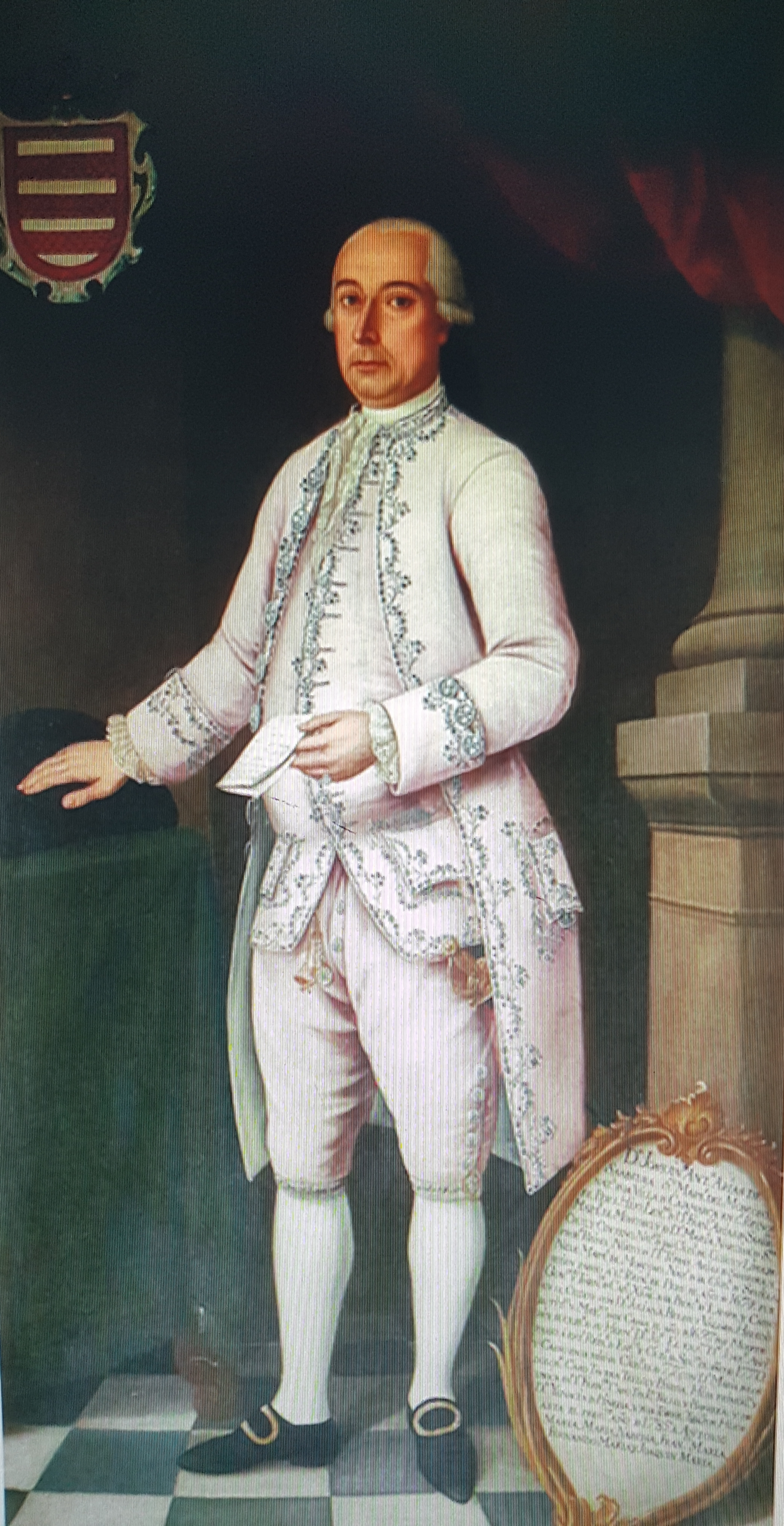 "Dn. Joaquín Antº. Arias de Saabedra 5º Marqueses del Moscoso natl.de la Villa de Cajamarca en ls Reynos del Perú. Hijo lexmo de Dn Franco. Arias de Sabvedra Marqueses del Moscoso y Dª María Narzisa de Sta Cruz y Centeno, Nat Las ciudades del Cuzco y Lima del Prop. Reino. Nieto de Dn. Tomás Arias de Saabedra y Neve Marqs. El Moscoso Nacional de la Ciudadela de Sevilla. y Trece de Cap. Xral de la Prova de Lampa, y Cassò en el Cuzco con Dª. Juliana Buleg y Valdes. Heredó el titlo y Maygos. de la Cassa el Año de 1697 por muerte sin éxito de su hermo. Dn. El expdo. Dn. Joaqn. Antº passó á ests. Reins. De. Espña y Ciudd de Sevlla. El año de 1770 y cassó en la misma Ciudd el de 77 con Dª. Maria de los Dolors. Caro Tavera Tello y Pineda. Hija Primaria y única de Dn. Ferndo. Caro Tavera. Tello y Barrera y de Da. Ygnacia de Pineda y de la Torre. Tienn por hijos asta el precte. Año de 1785. a Antonio Maria, Maria Narci SA, Franco. María, Fernando María y Joaquín María ".